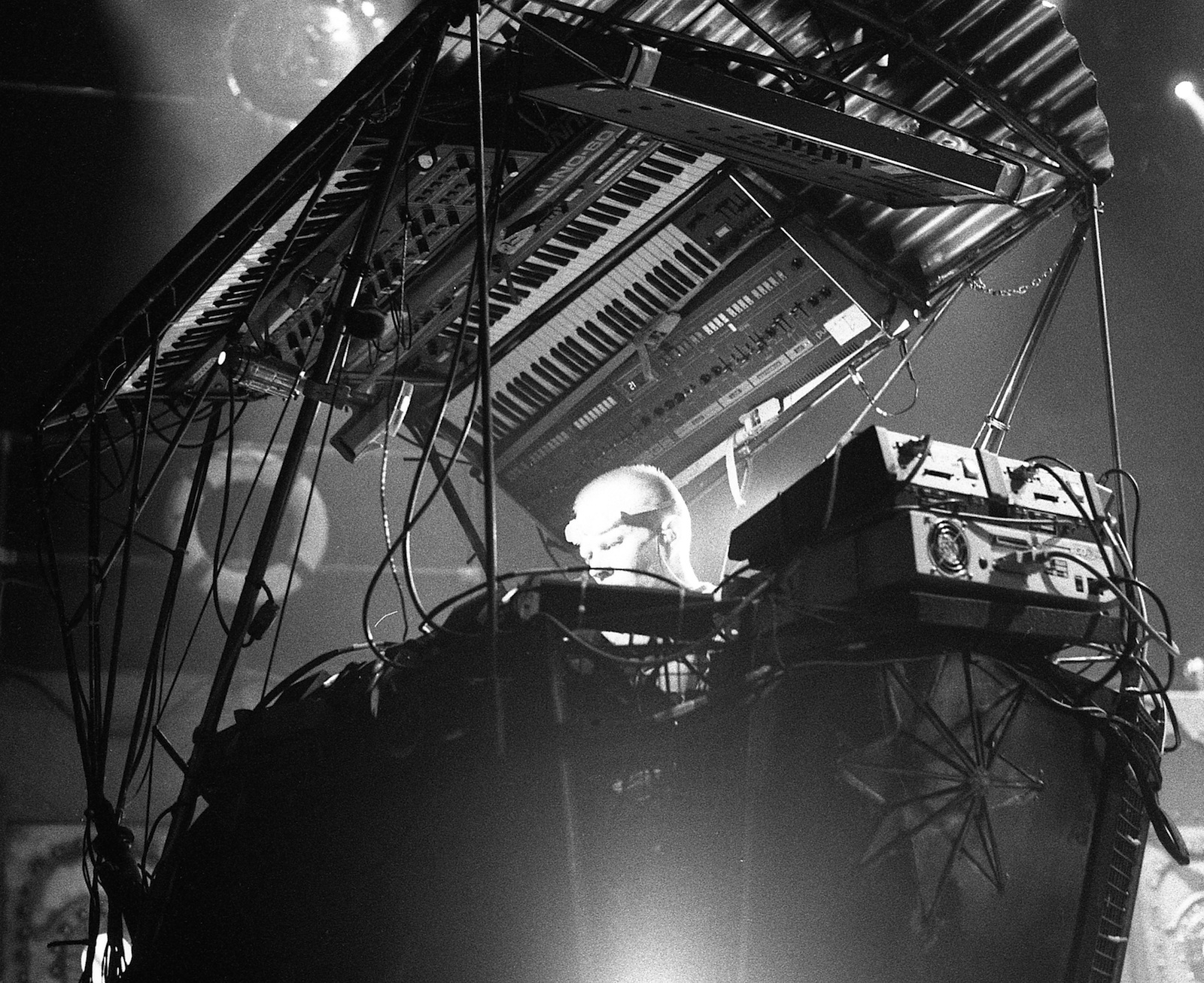 Erasure (Vince Clarke) bei einem Konzert in Magdeburg am 08.09.1992